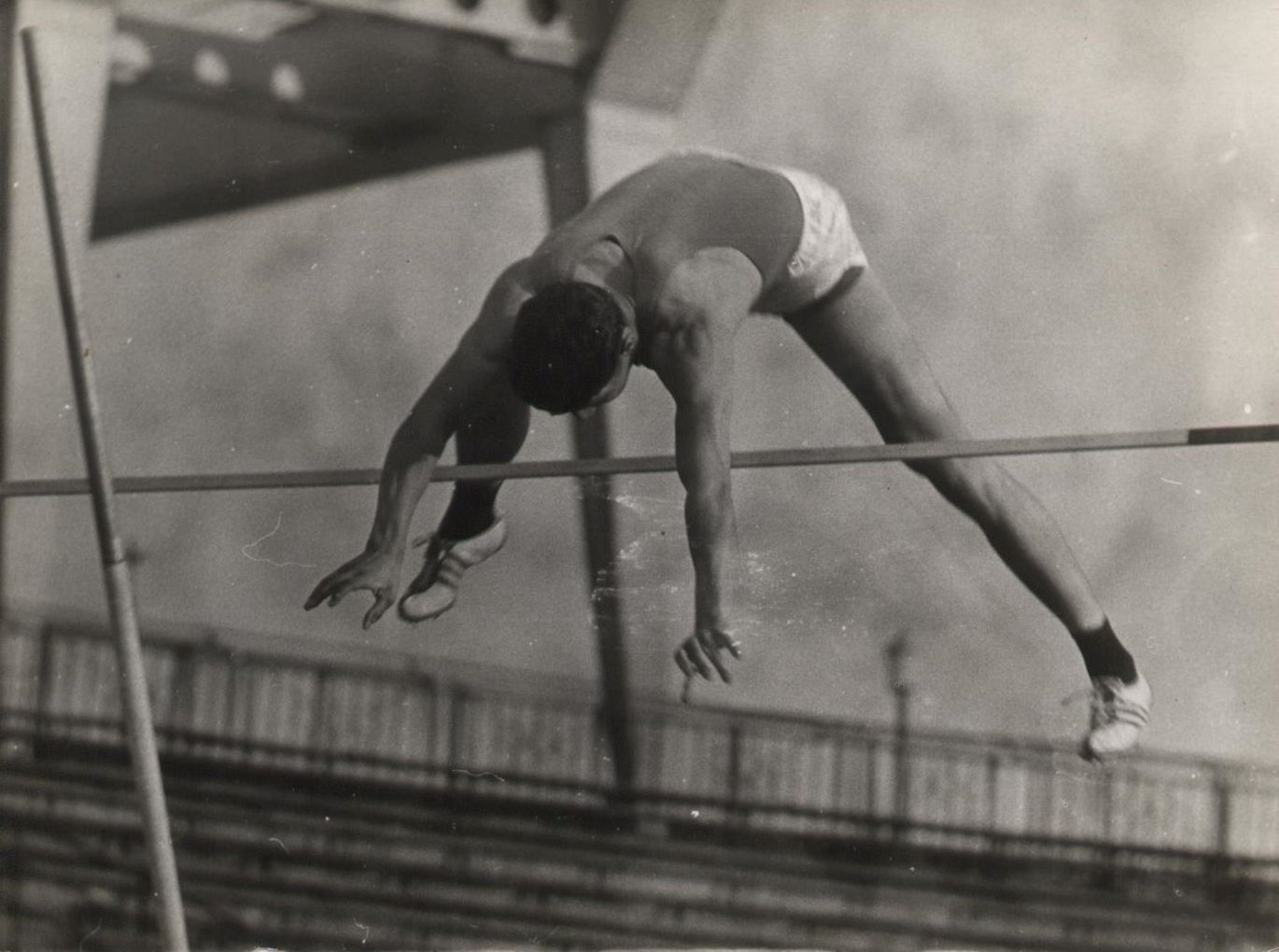 Horváth János a léc fölött egy versenyen